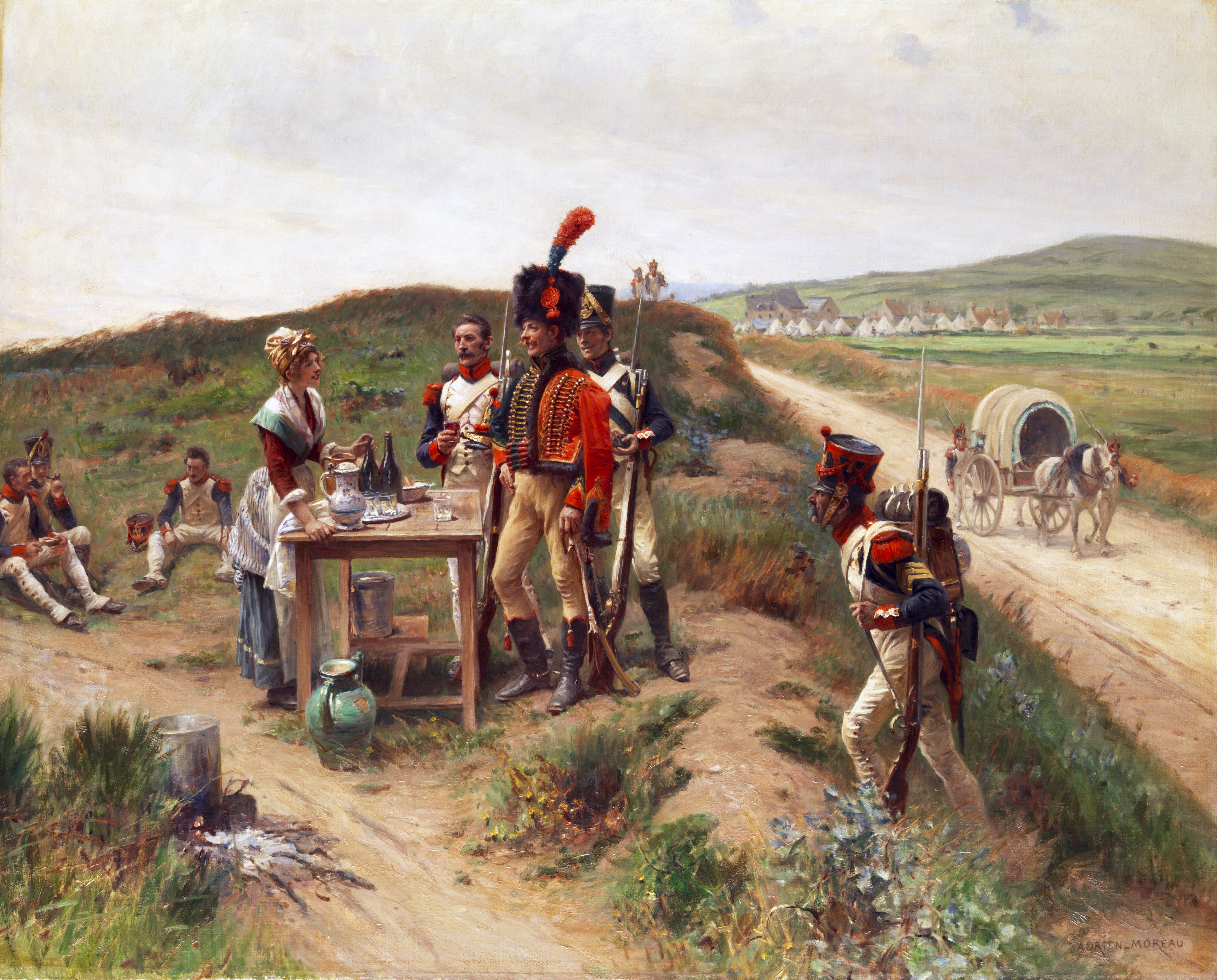 Soldaten bei einer jungen Markthändlerin auf der Rast. Öl auf Leinwand. 56 x 81 cm.